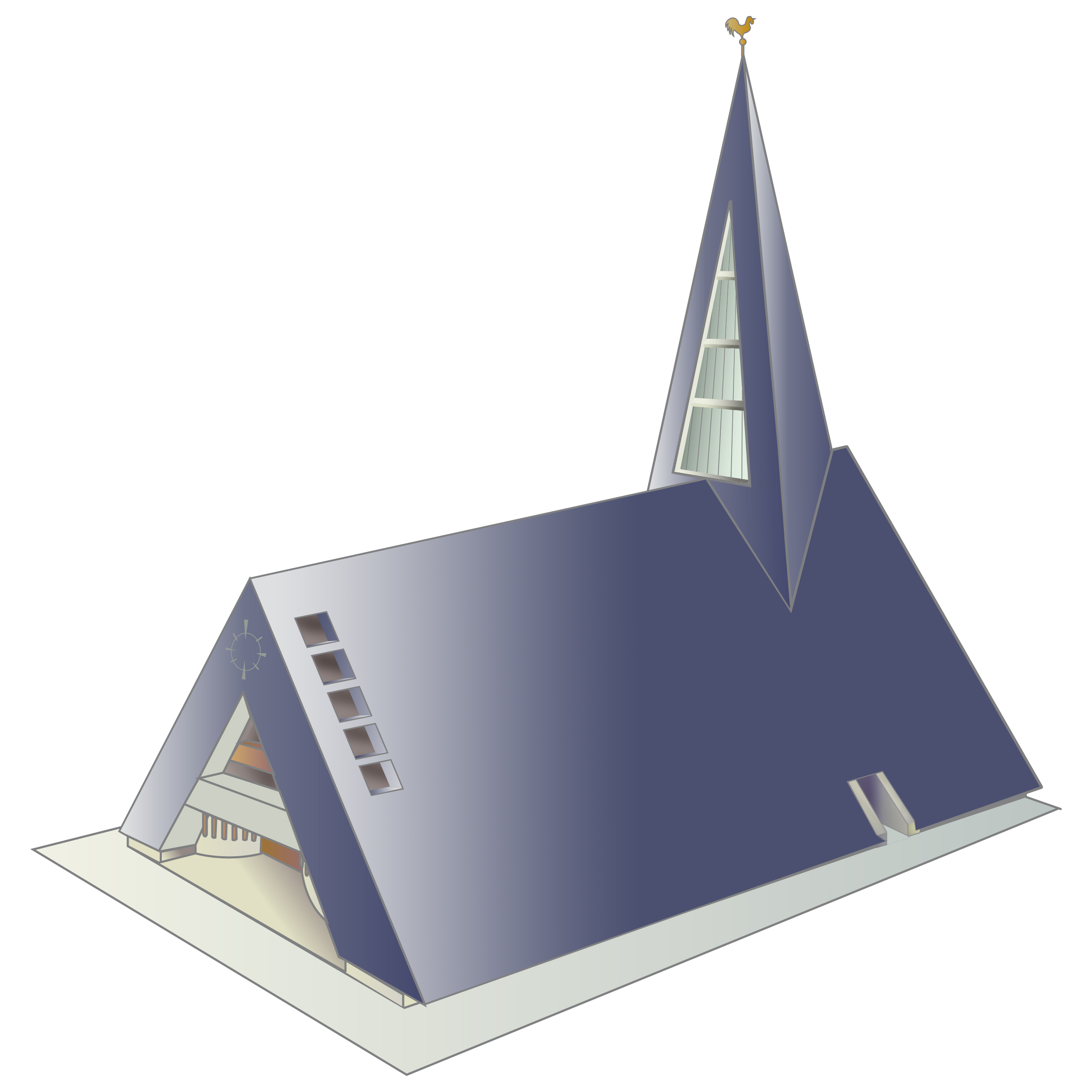 Corrections sur la flèche